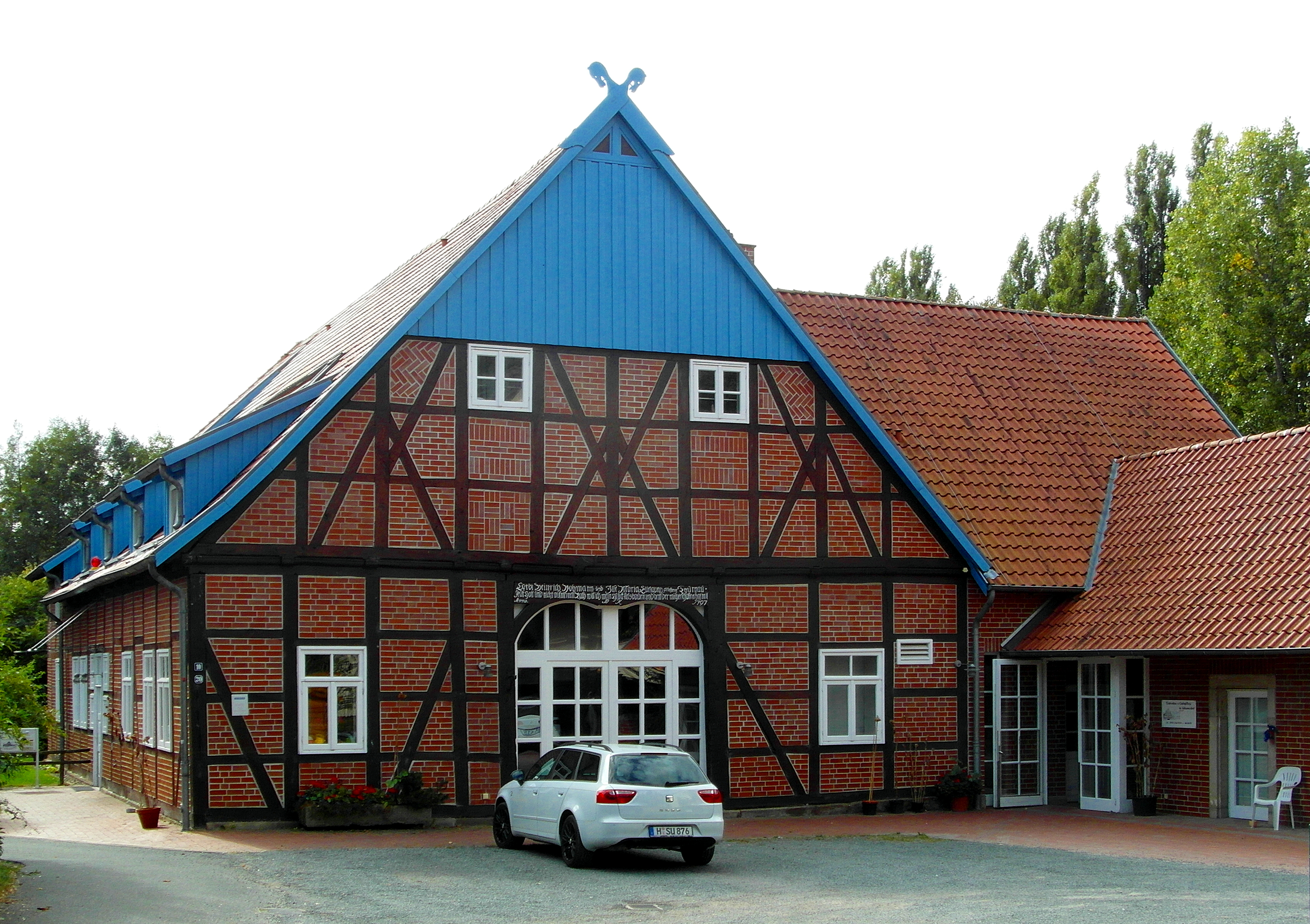 Der Johanneshof Wettbergen, heute Am Hohmannhof 10 steht unter seiner früheren Adresse An der Kirche 20 auf der Baudenkmalliste.